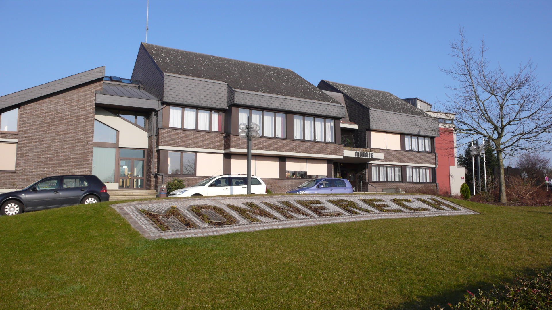 Gemeng Monnerech